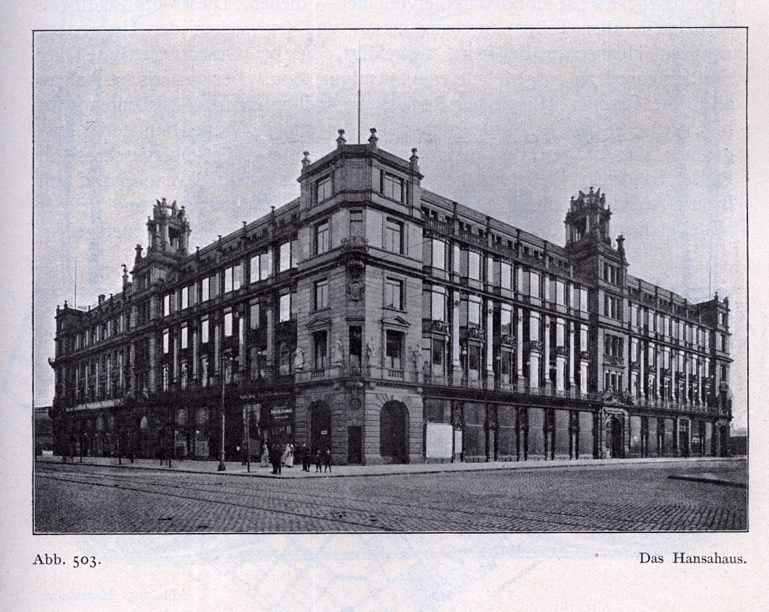 Geschäftshaus "Hansahaus" am Wilhelmsplatz in Düsseldorf, für die "Rheinische Immobiliengesellschaft Hansa", von Architekt Heinrich Ernst 1900 bis 1902 erbaut